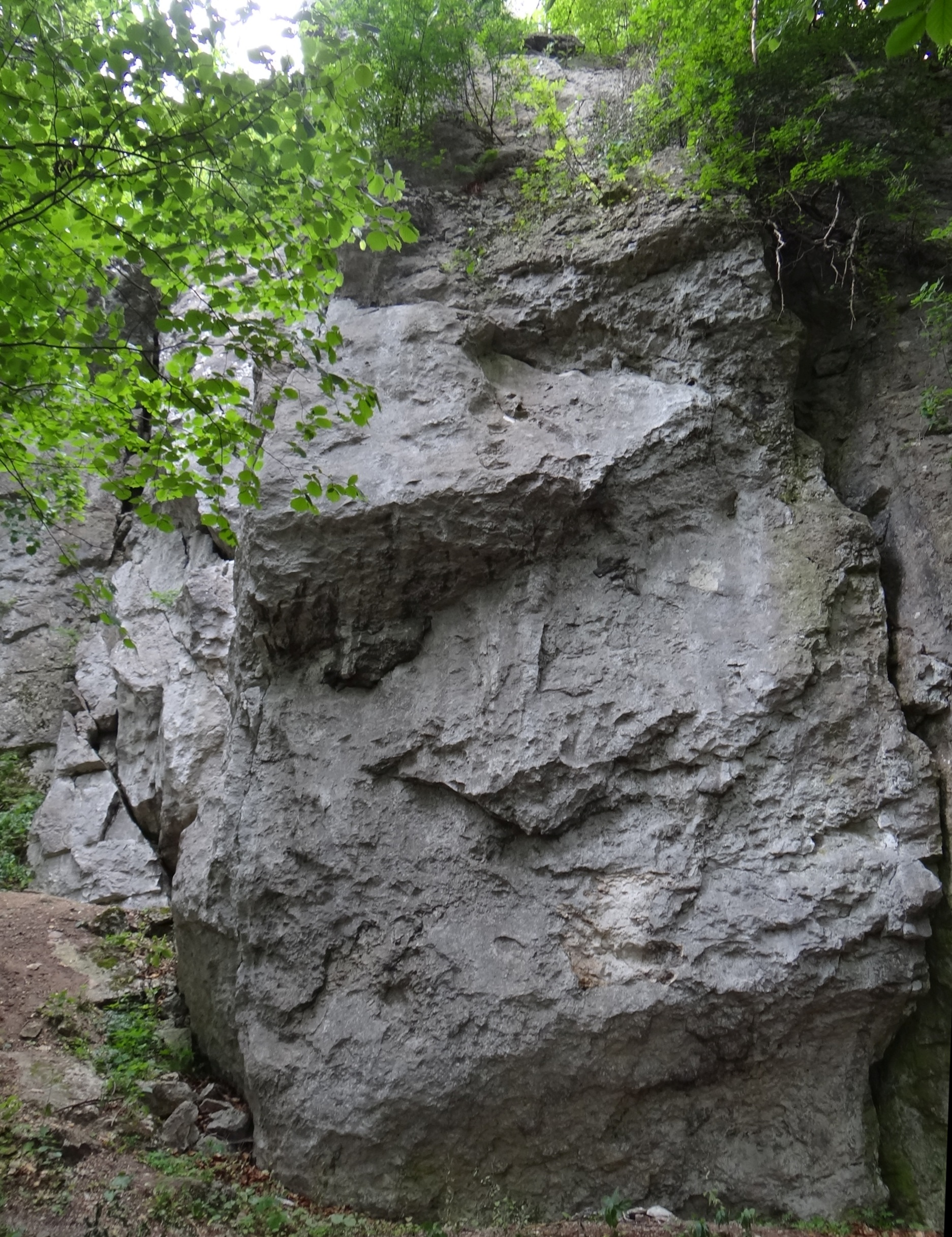 Skała Gips V na wzgórzu Łężec między Morskiem i Podlesicami